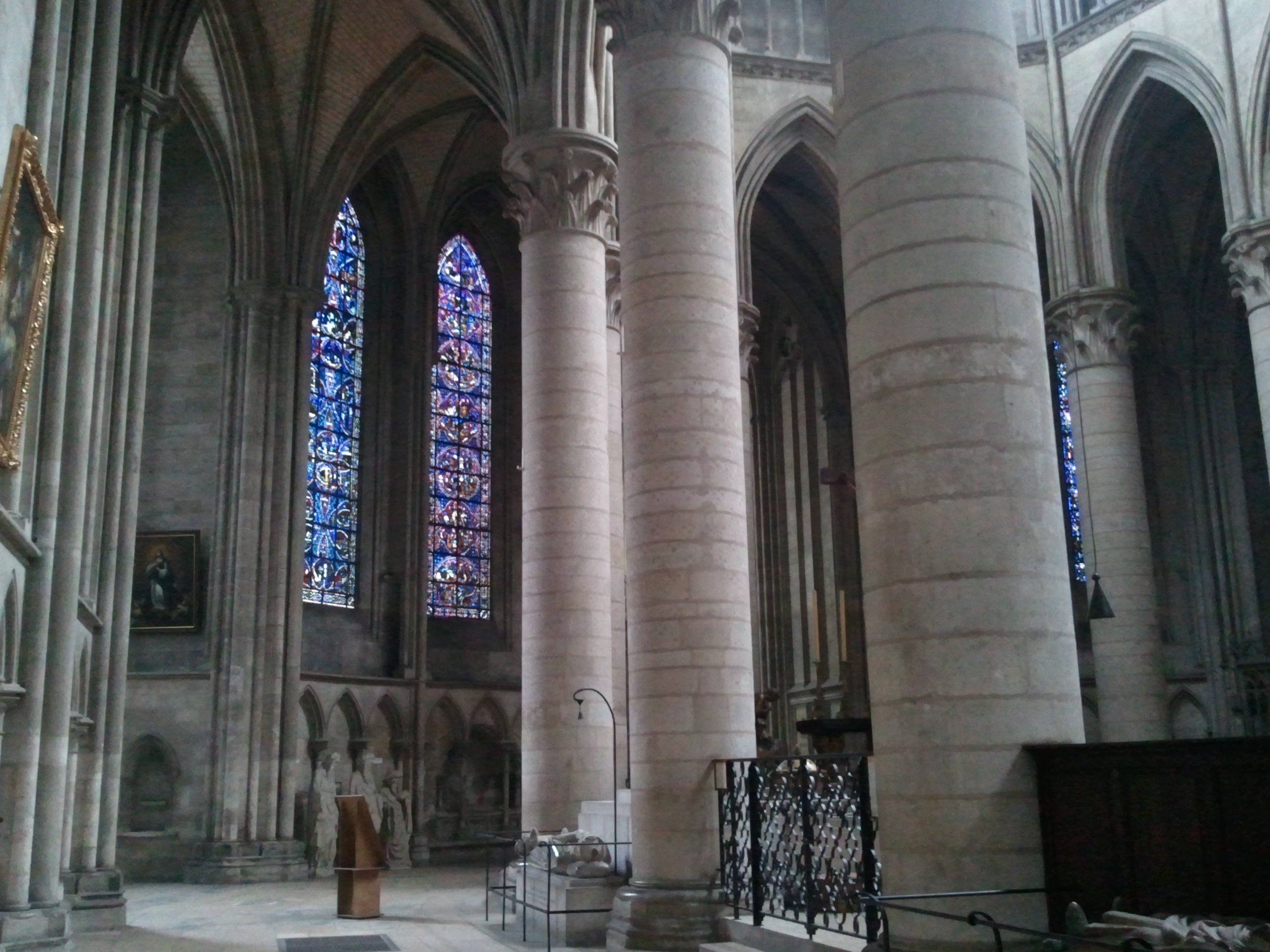 Cathédrale de Rouen, déambulatoire